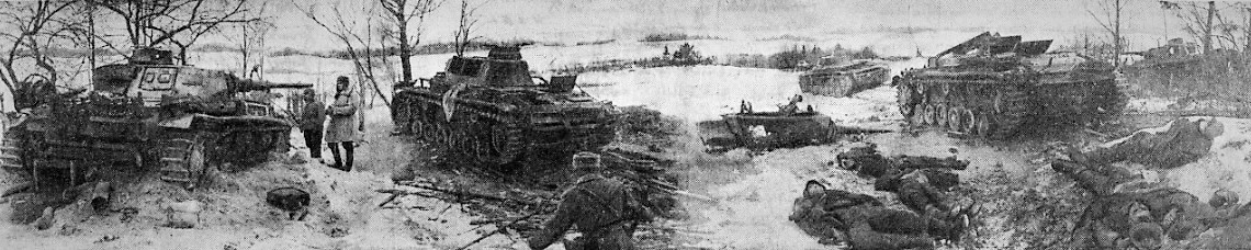 Панорама: немецкие танки, подбитые на дальних подступах к Москве. Фотография опубликована в газете "Правда" 15 ноября 1941 года